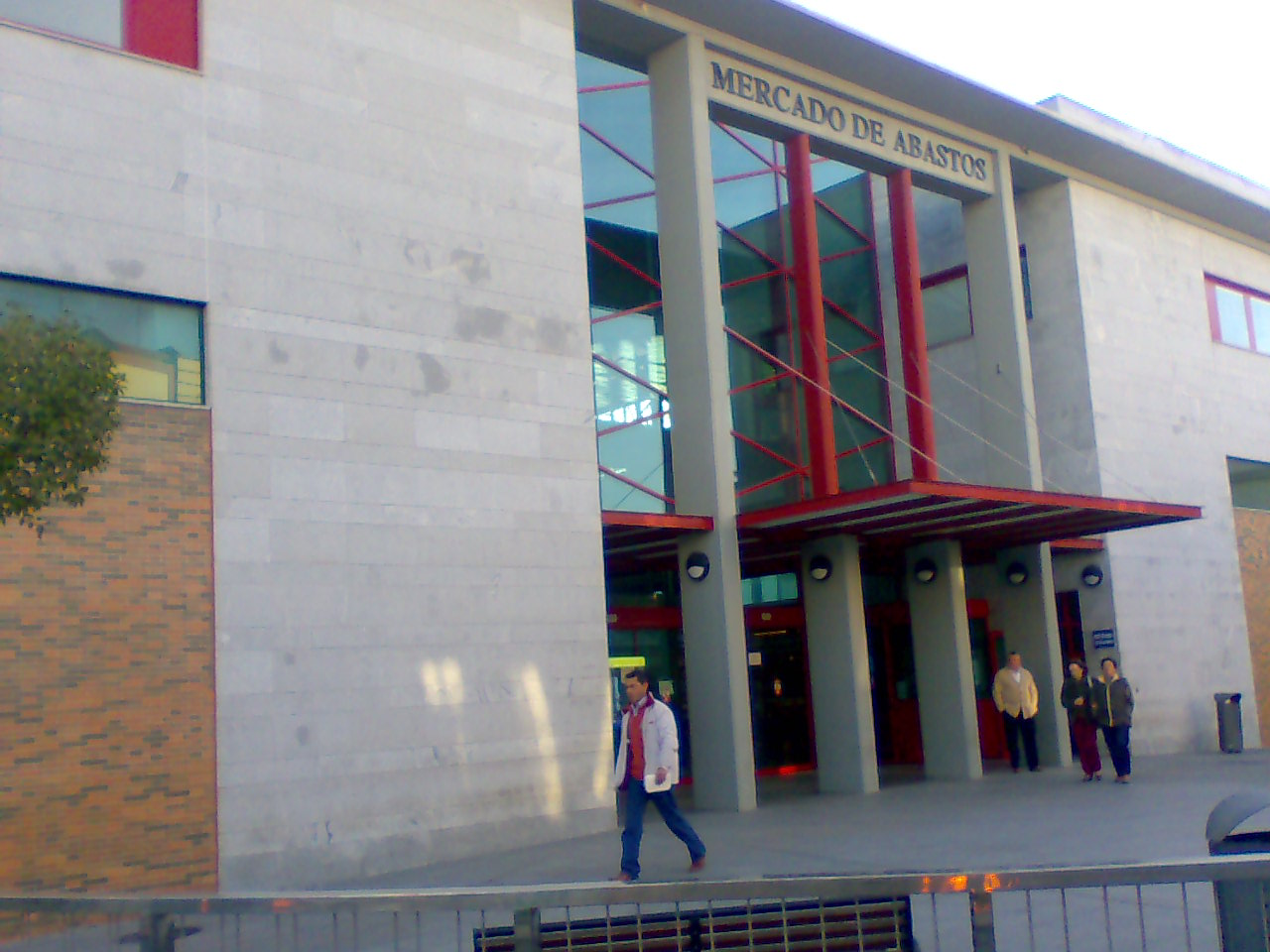 Mercado de abastos de Dos Hermanas (Sevilla)